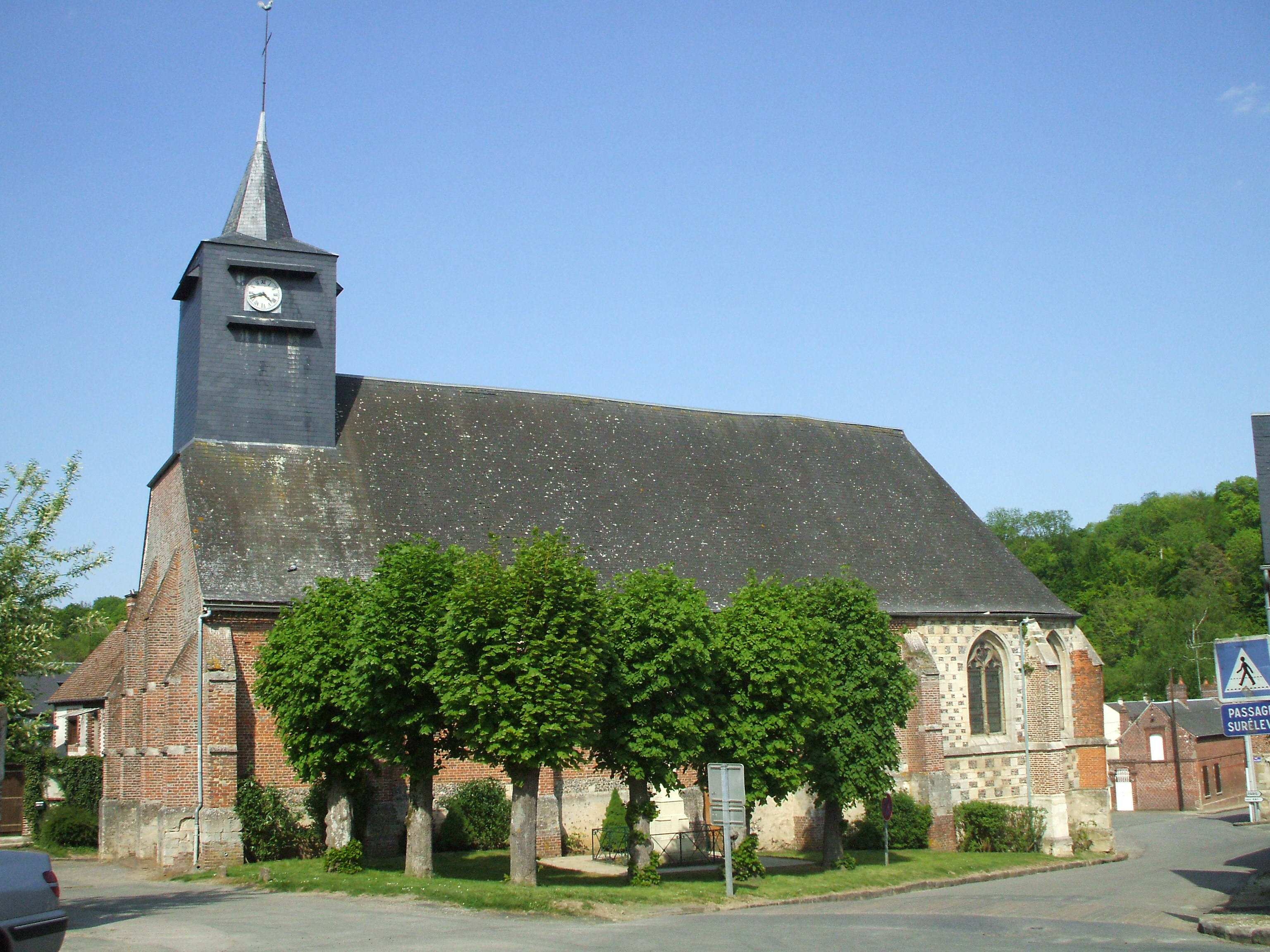 église de Mortefontaine-en-Thelle oise france